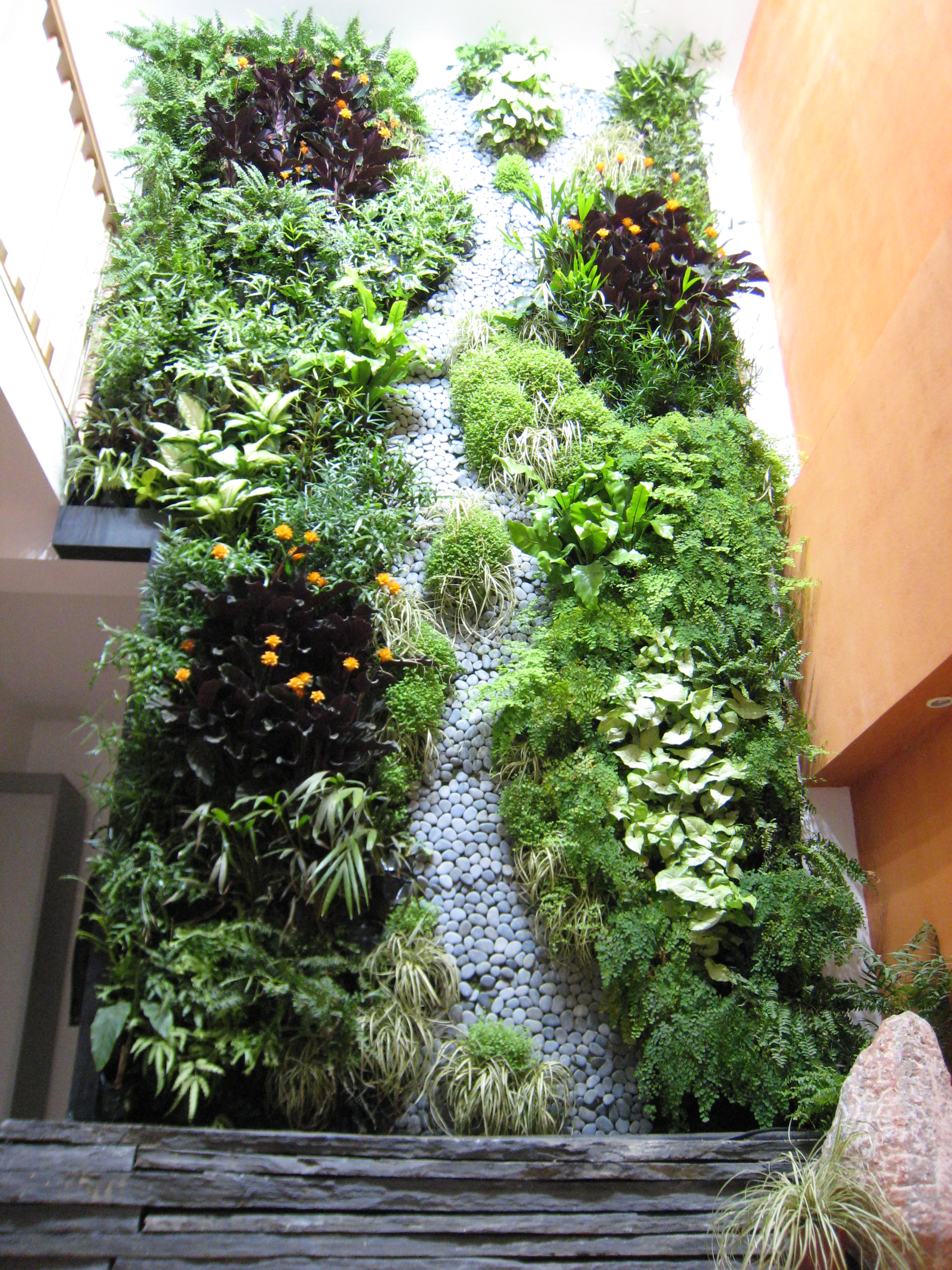 Mur végétal avec une rivière de galets réalisé par les Jardins de Babylone en intérieur